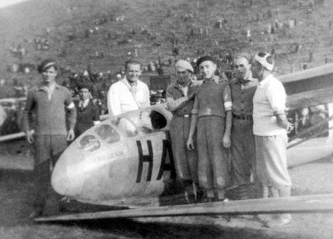 Rotter Lajos és az általa tervezett Karakán repülőgép. (Rotter balról a második fehér ruhában)